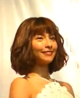 写真集『一見峮心』発売に際しての記者会見